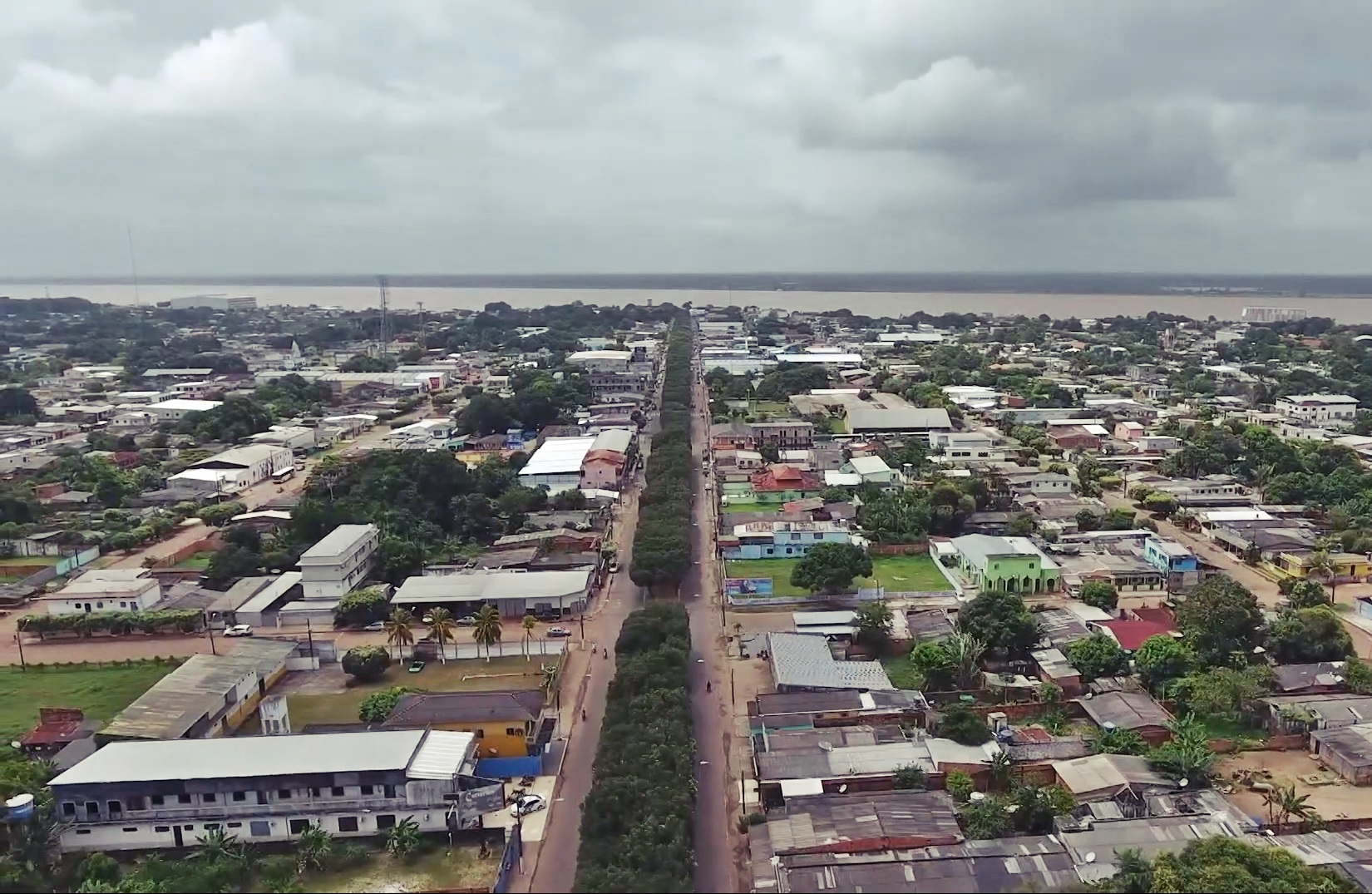 Município de Itacoatiara, localizado na Região Metropolitana de Manaus, no Estado do Amazonas, Brasil.